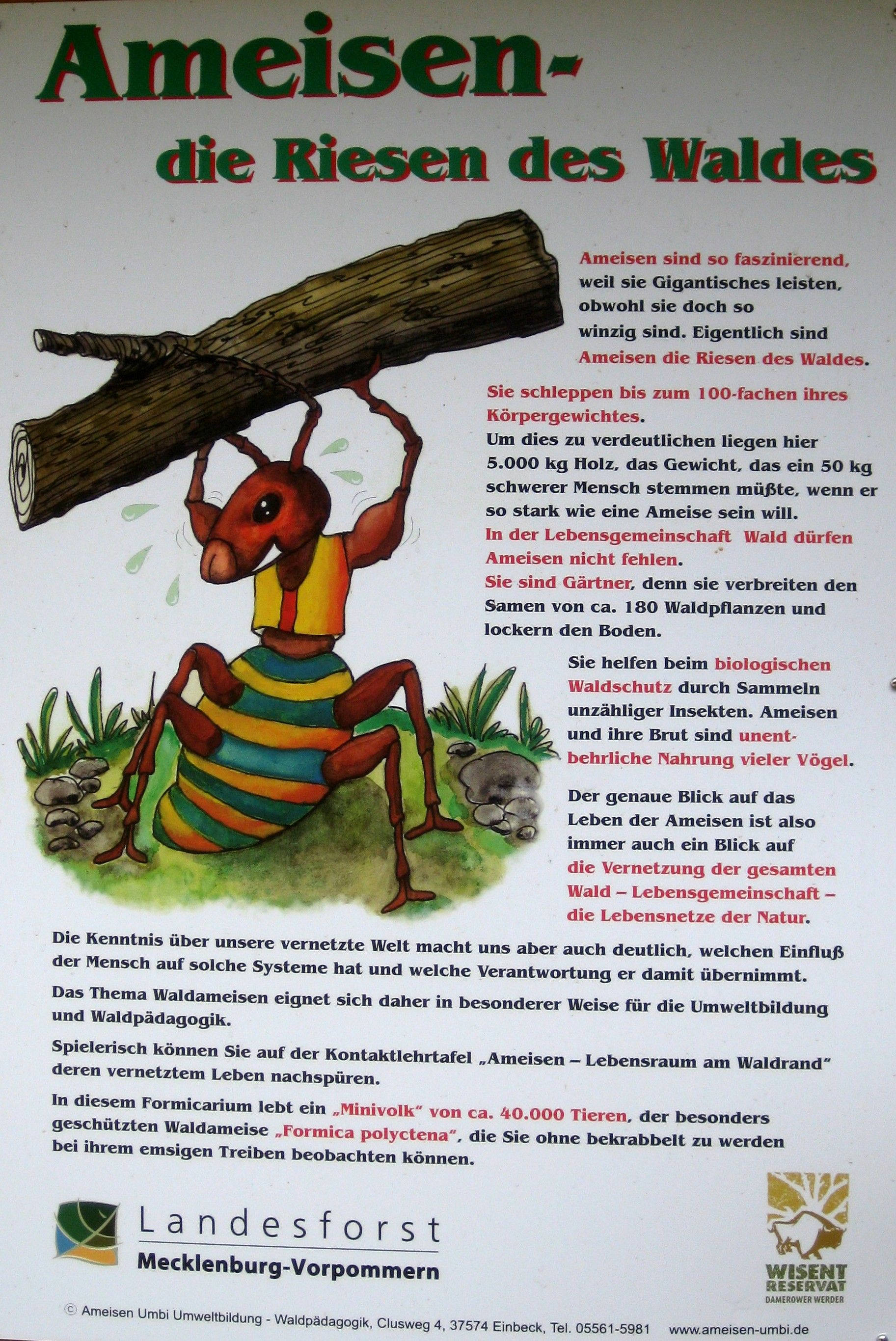 Ameisenschautafel im Wisentgehege auf dem Damerower Werder bei Waren (Müritz)